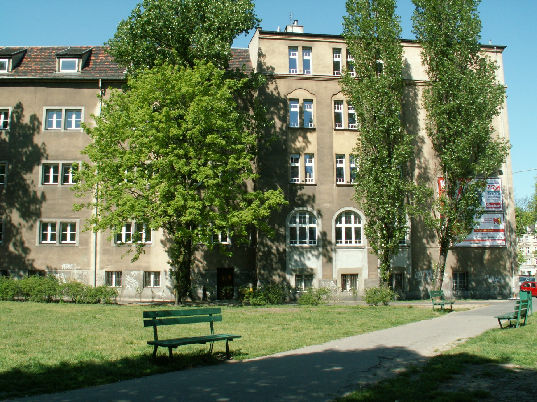 VI LO w Poznaniu - Widok od ul. Karmelickiej